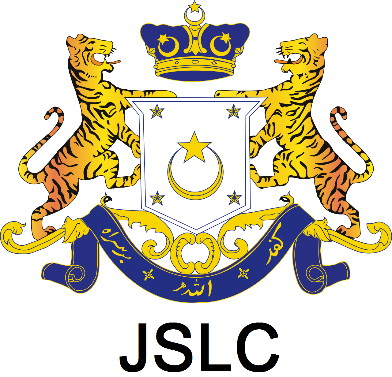 Digunakan untuk urusan rasmi dan lambang organisasi.